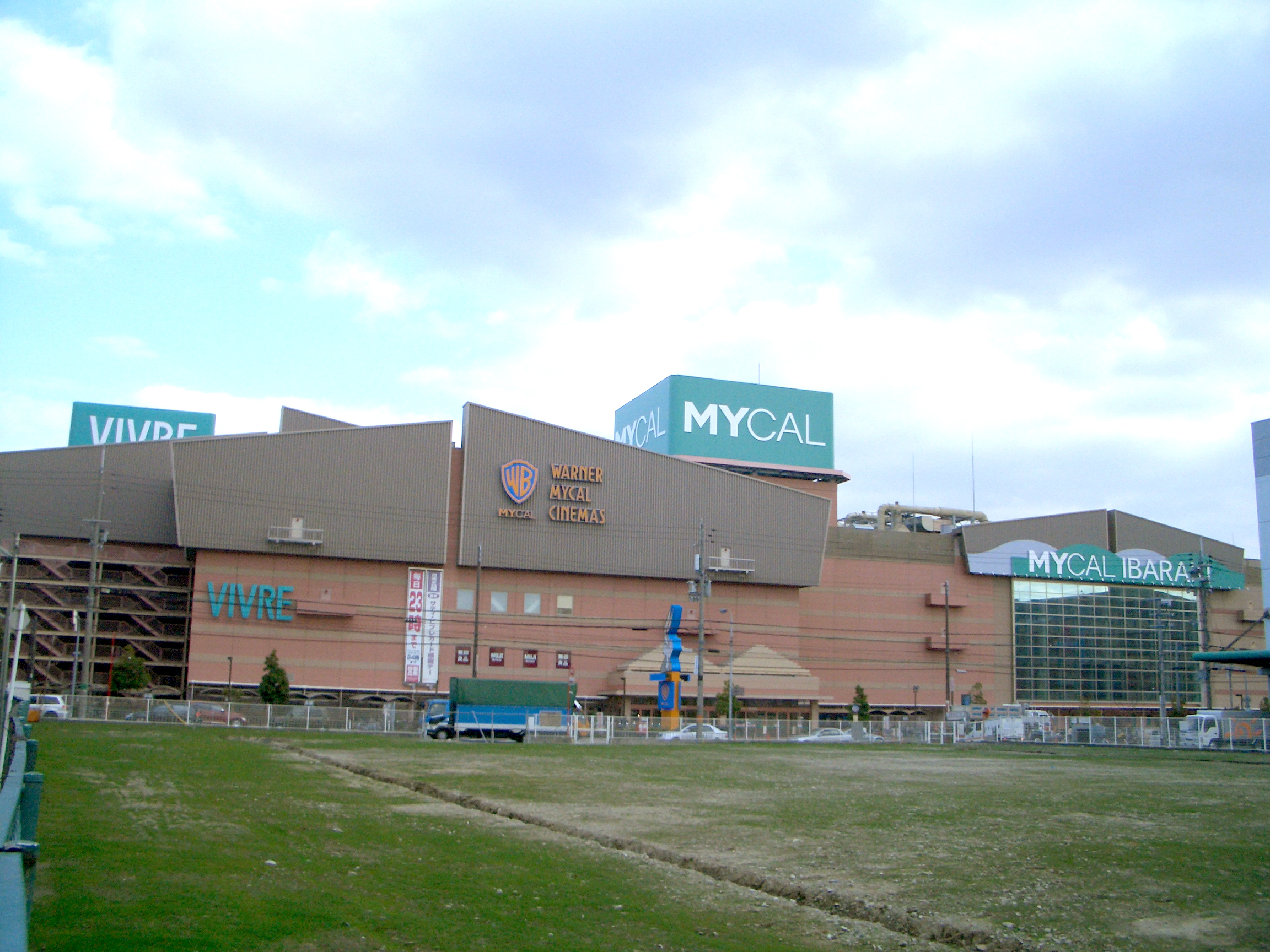 MYCAL IBARAKI,Shimohozumi Ibaraki-City Osaka Japan.